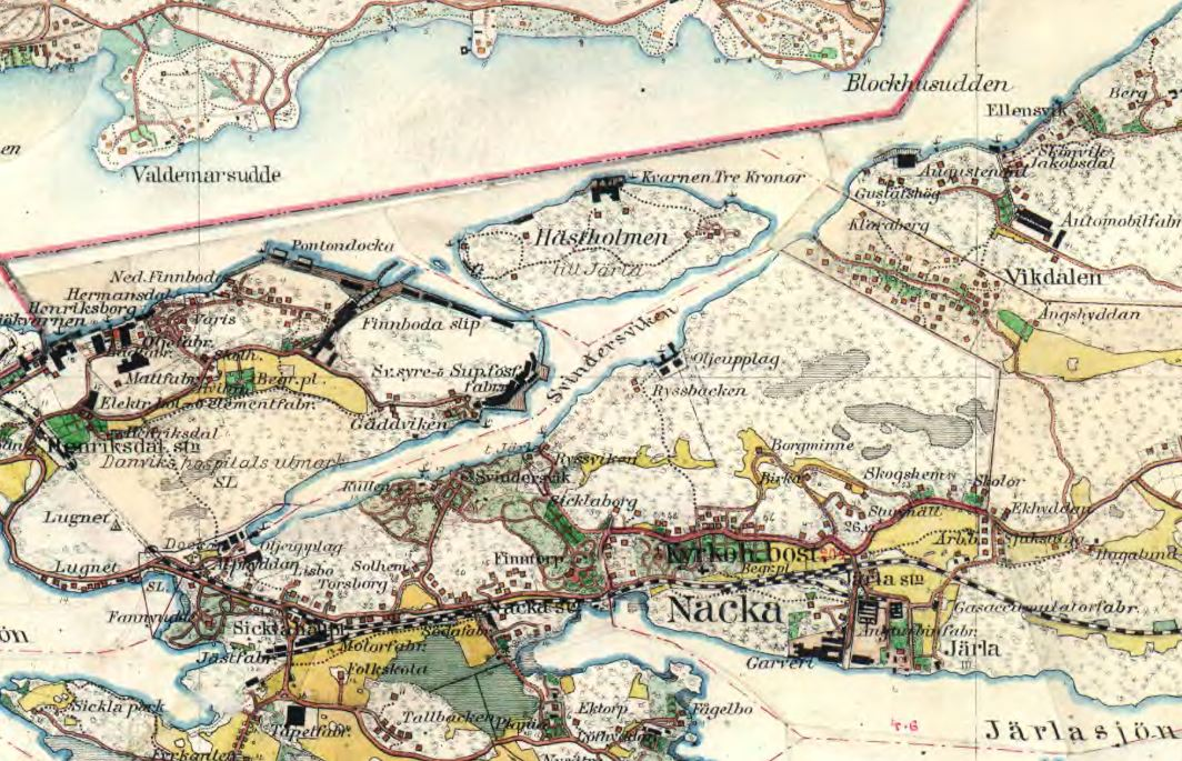 Häradsekonomiska kartan över Nacka med Hästholmen (idag Kvarnholmen)